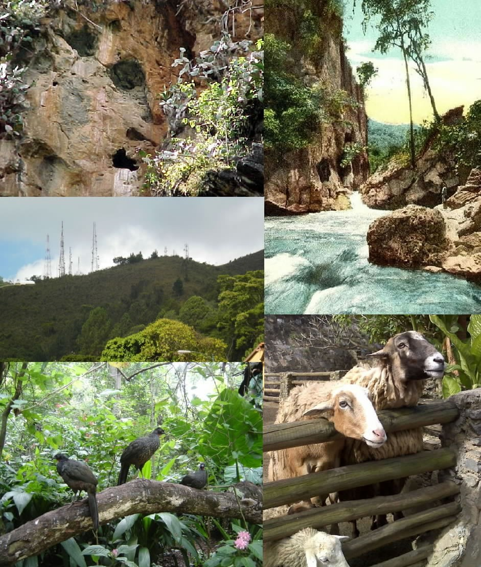 Imagenes: Cuevas de Indio (La Guairita) Cañón del río Guaire y Cueva los Carros Cerro El Volcán Gucharacas (Orthalis rufucauda) en quebrad La Boyera Expanzoo